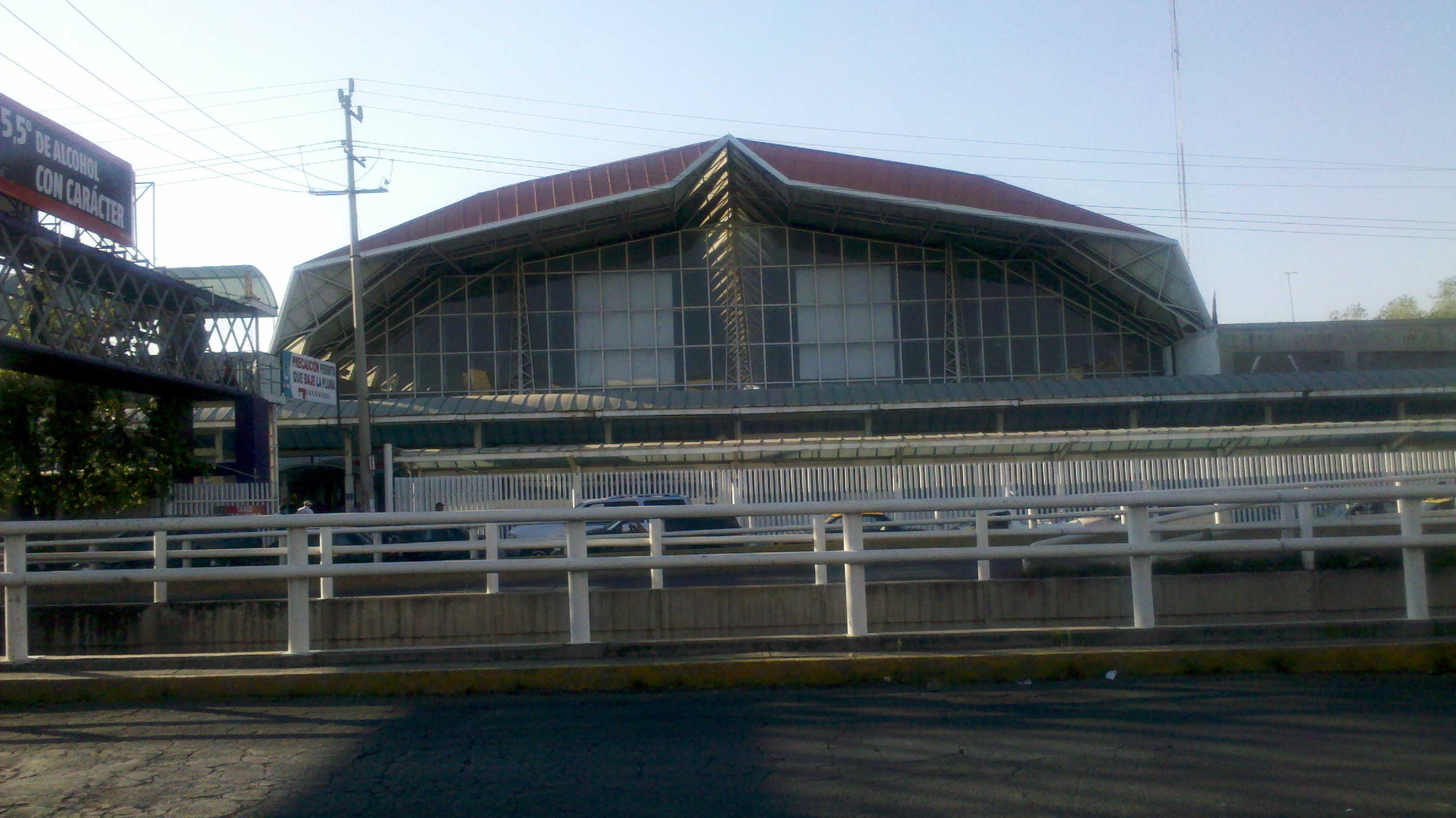 Central de Autobuses Puebla (CAPU). Boulevard Norte 4222. Puebla, México. Vista desde el Boulevard Norte.